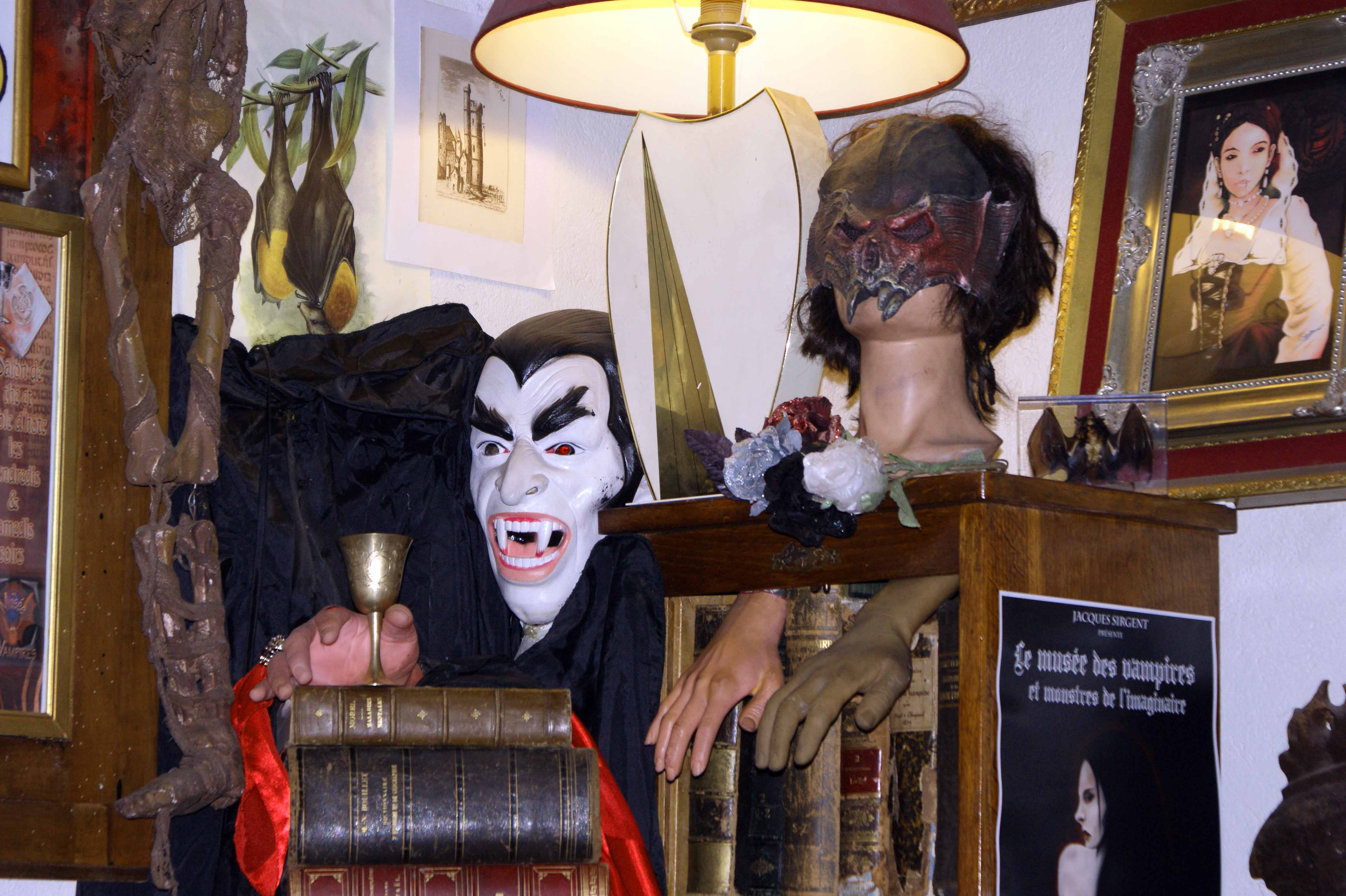 Ensemble d'objets et d'ouvrages anciens consacrés aux vampires au musée des vampires, porte des Lilas.